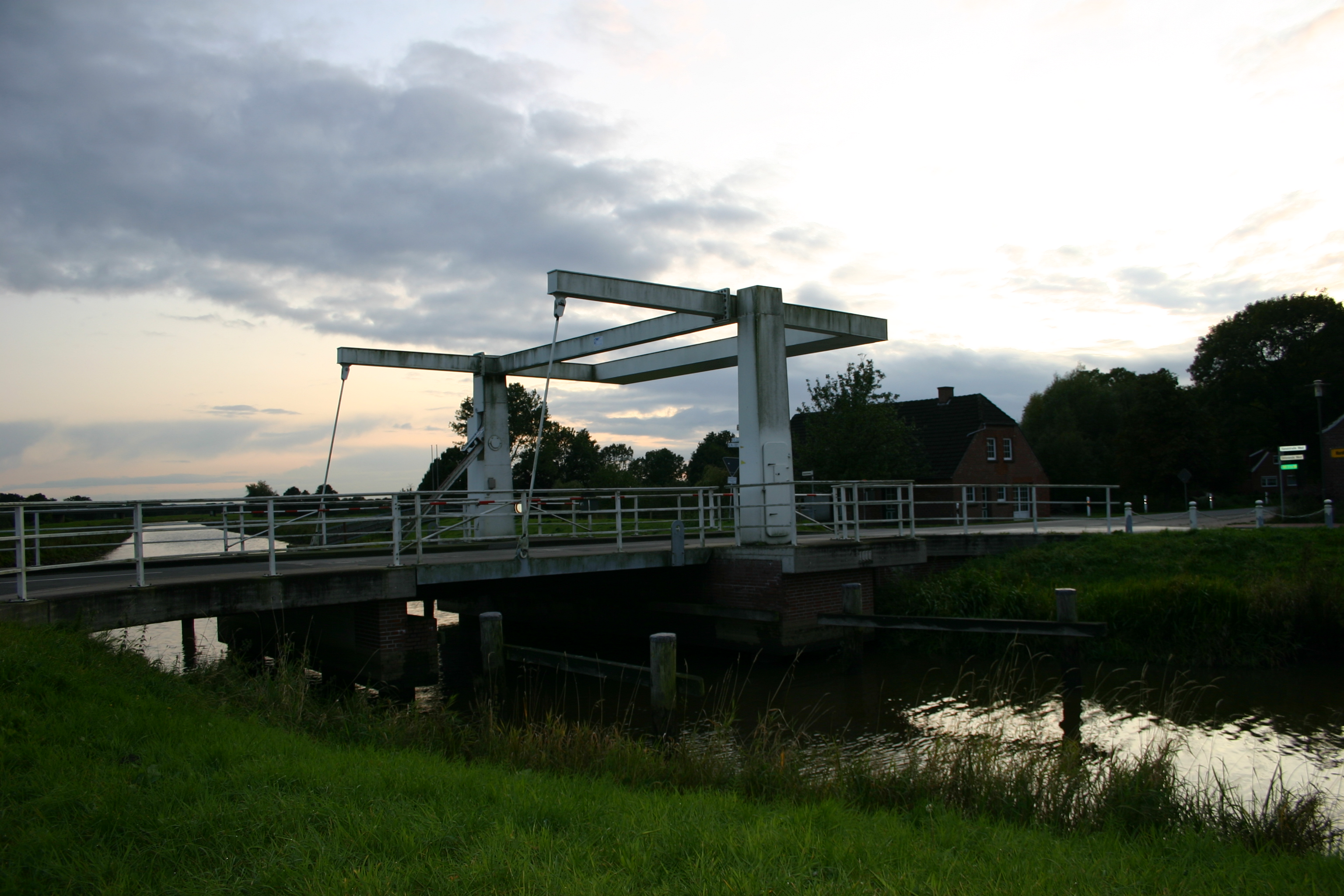 Brücke über den Nordgeorgsfehnkanal in Brückenfehn (Gemeinde Filsum, Samtgemeinde Jümme, Landkreis Leer)